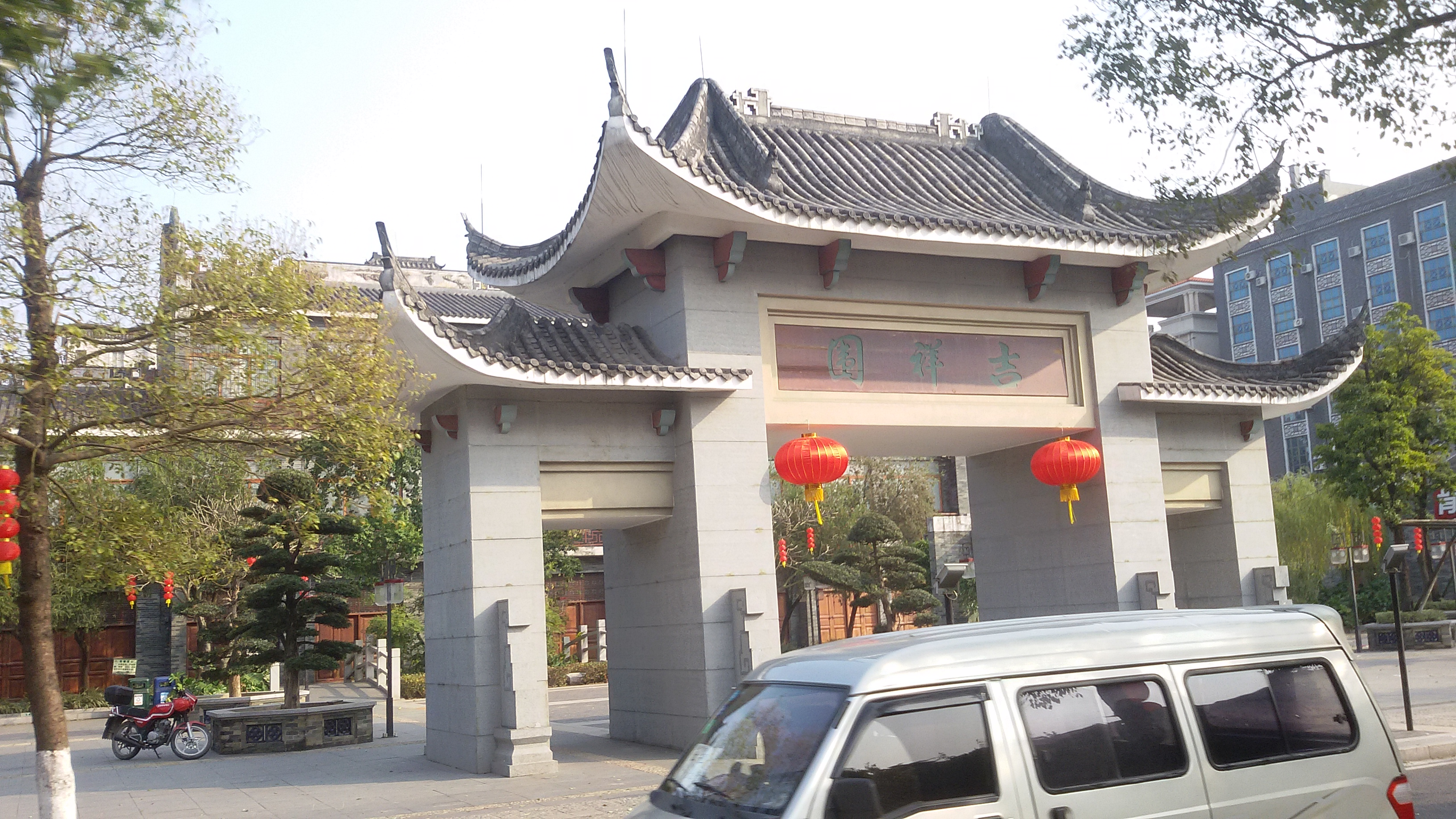 粵語: 南沙區東涌鎮吉祥圍